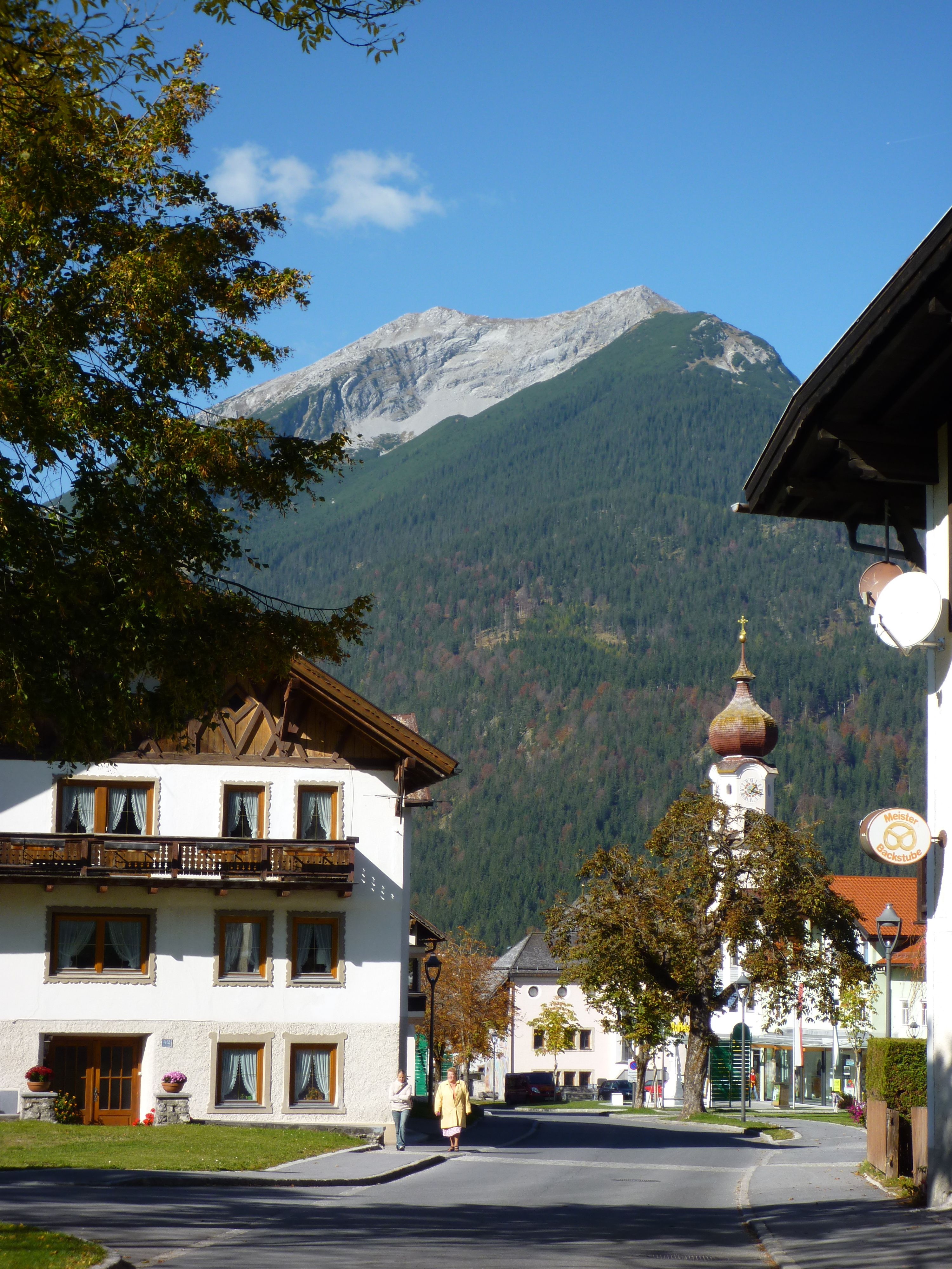 Ehrwald - Ortsmitte mit Daniel 2340 ü.NN